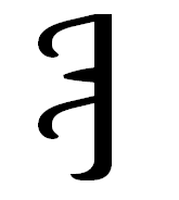 вавхэргэнь